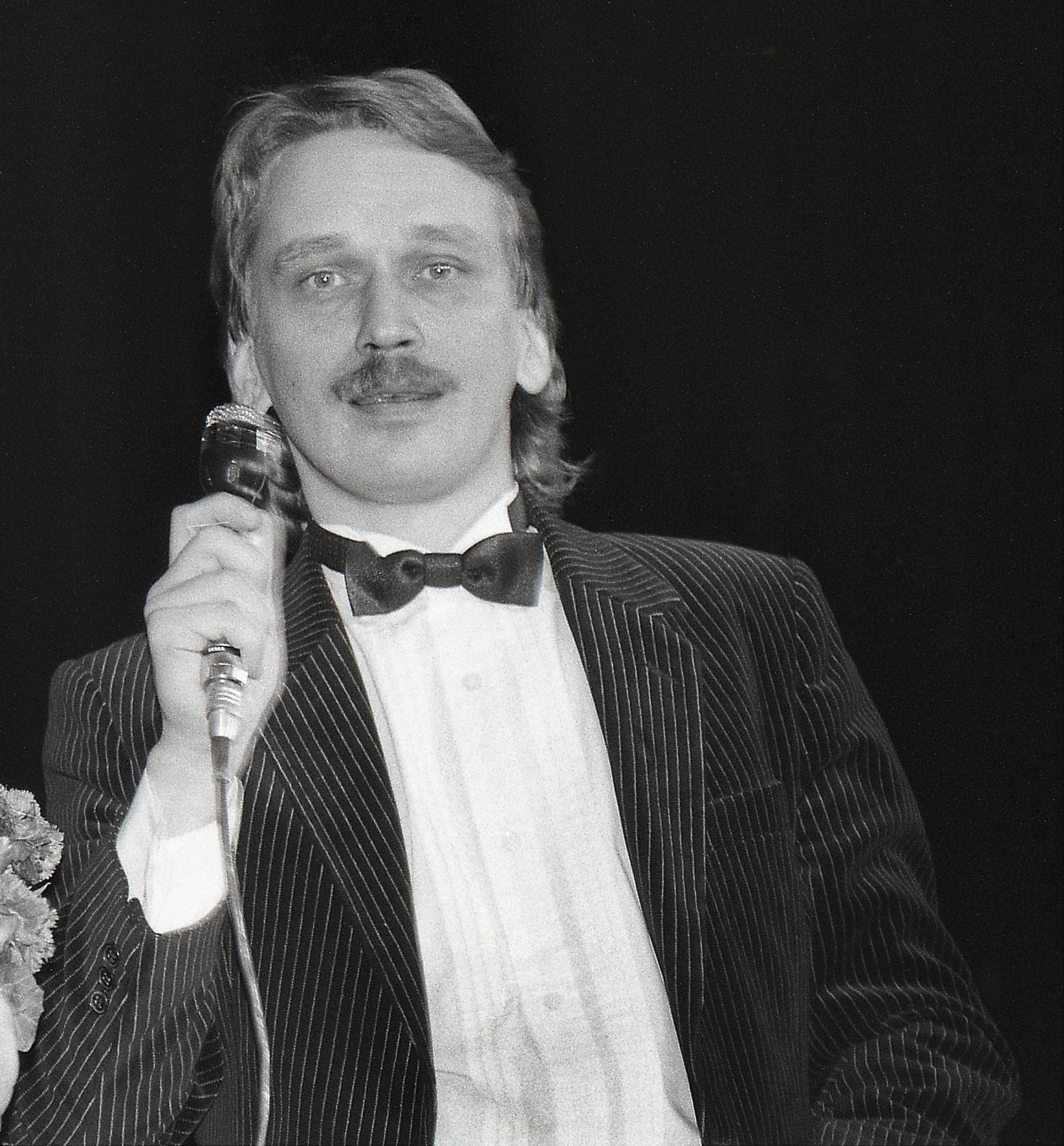 Harri Kingo